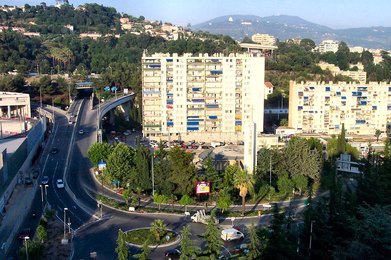 Eglise Saint-Jean l'Evangeliste in Nice nord Situation générale.